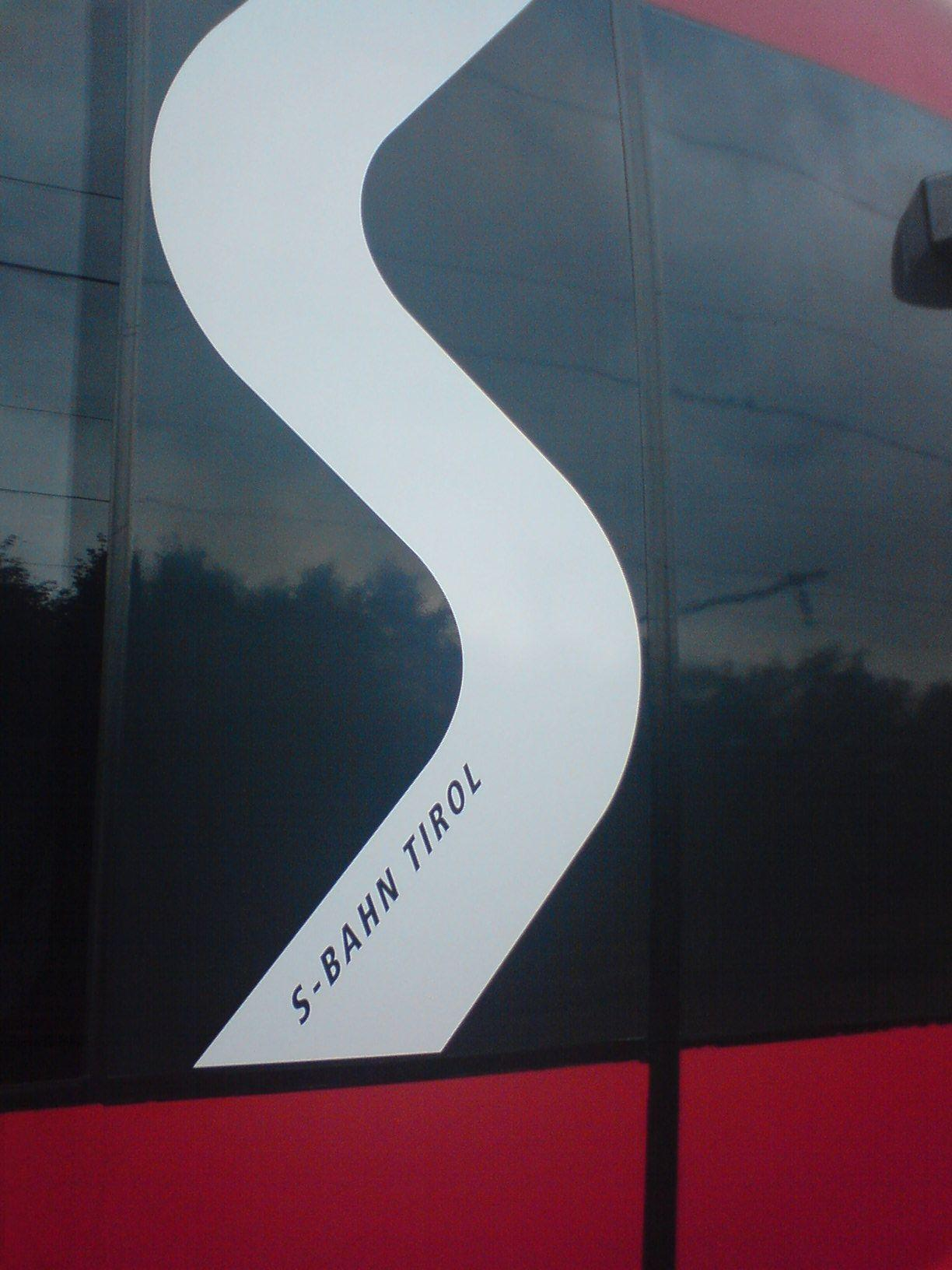 S-Bahn Tirol, neues Logo auf Triebwagengarnitur, Sommer 2010, Detail